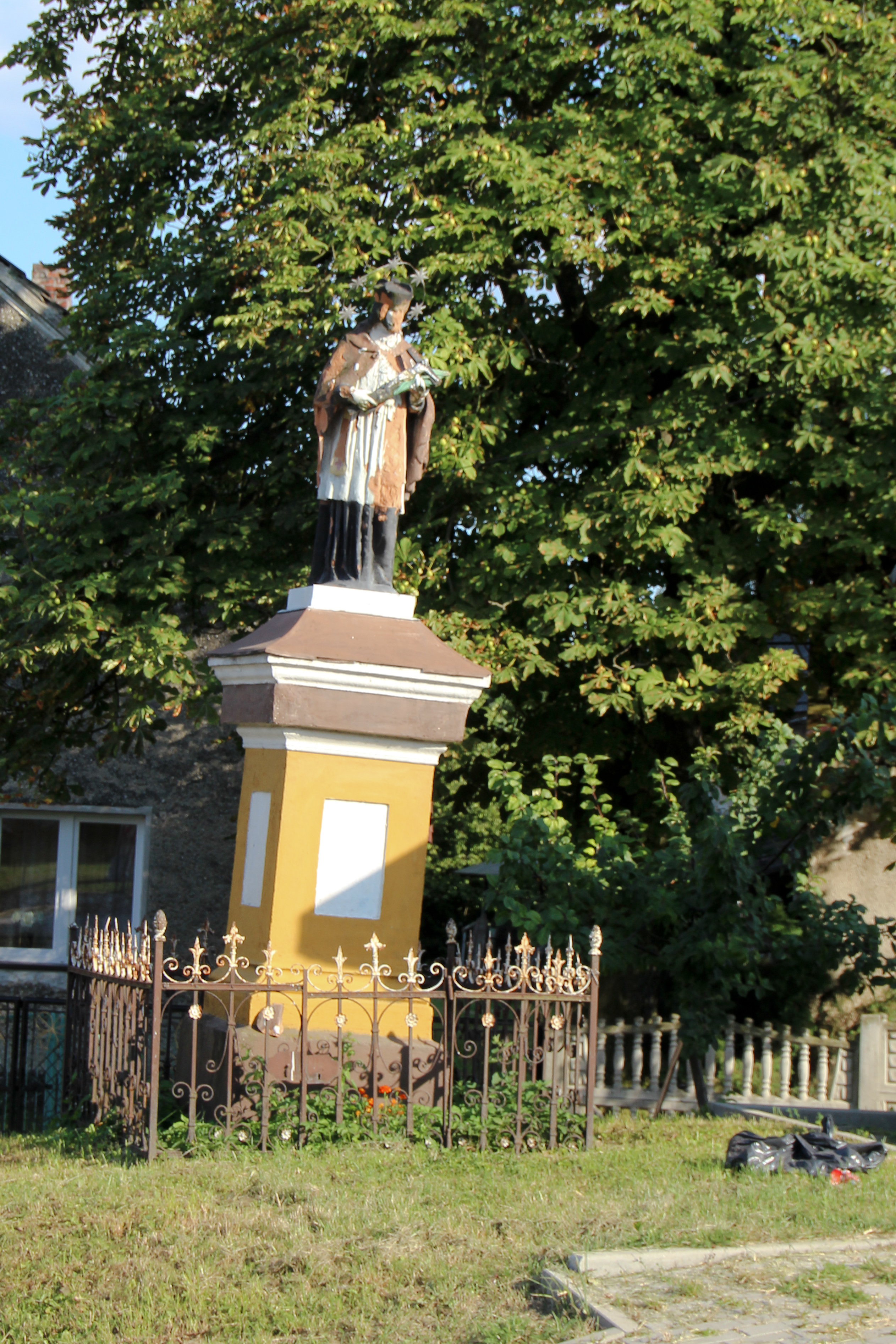 Ścinawa Nyska – figura św. Jana Nepomucena.